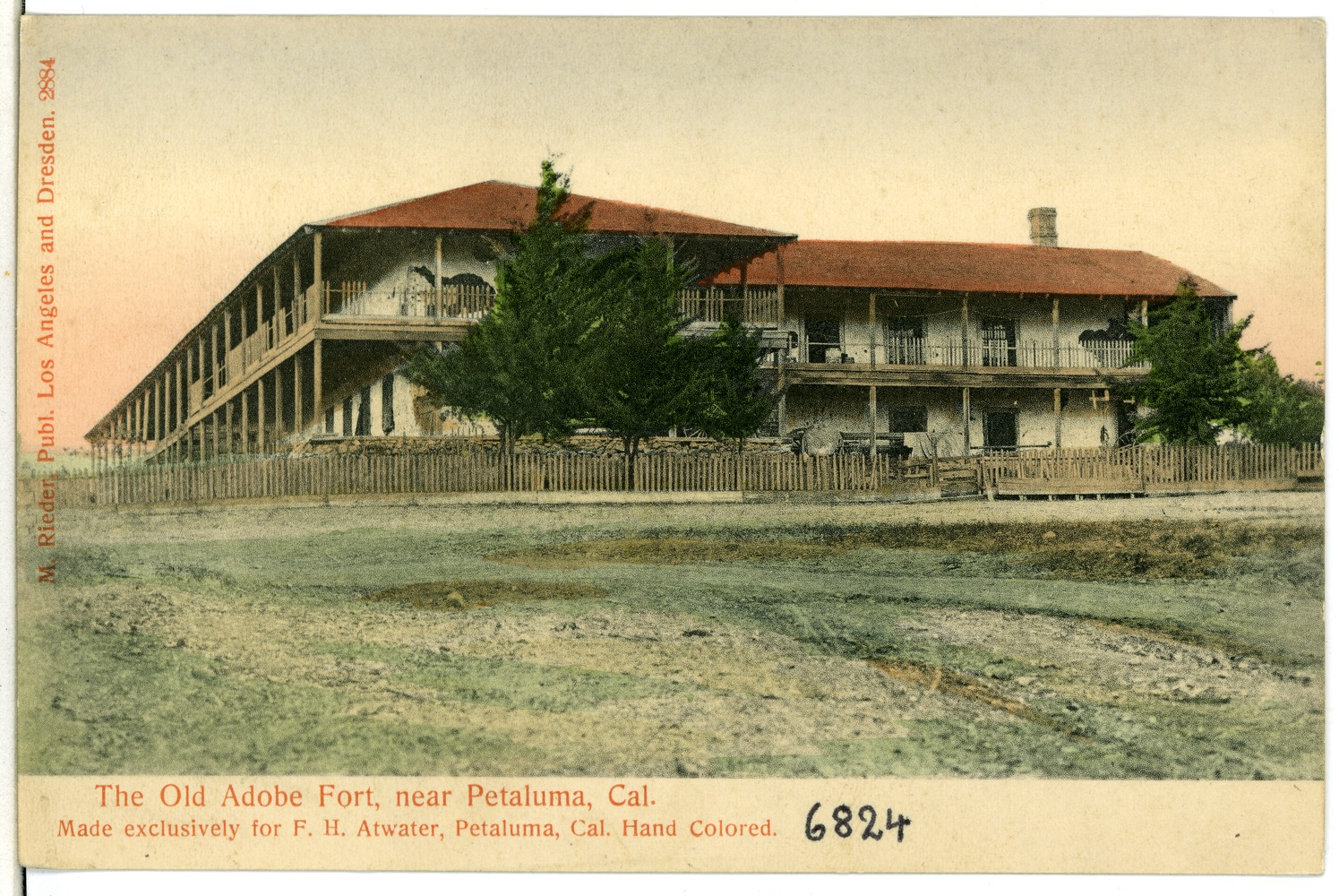 Petaluma; The Old Adobe Fort This postcard is from publisher Brück & Sohn in Meißen ( This postcard has a unique number 06824 and is available in a higher resolution at the publisher. This images was uploaded in a cooperation project between Wikipedians and the publisher.